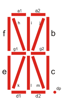 Aufteilung und Benennung der einzelnen Segmente einer Sechzehnsegmentanzeige.